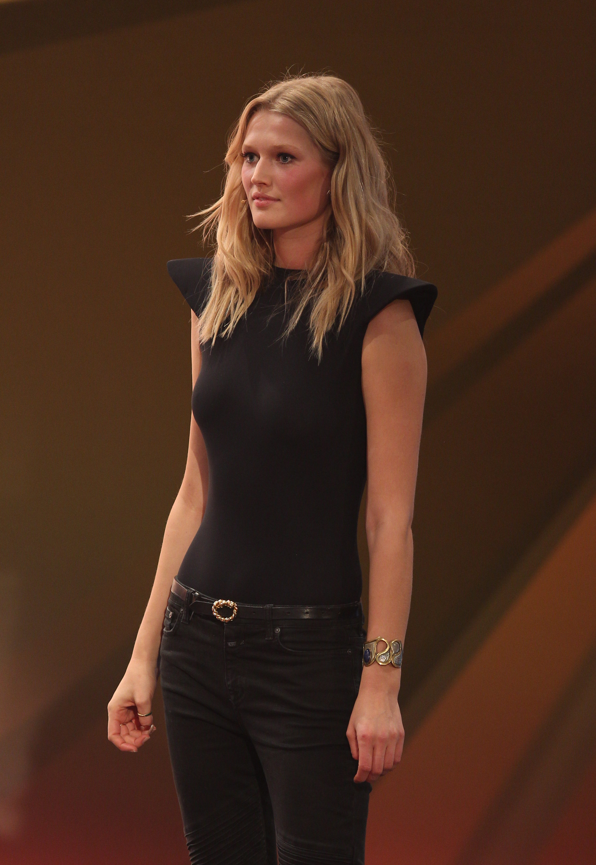 Wetten, dass.. ? 214. show in Graz, 8. Nov. 2014 Toni Garrn at 214. Wetten, dass.. ? show in Graz, 8. Nov. 2014